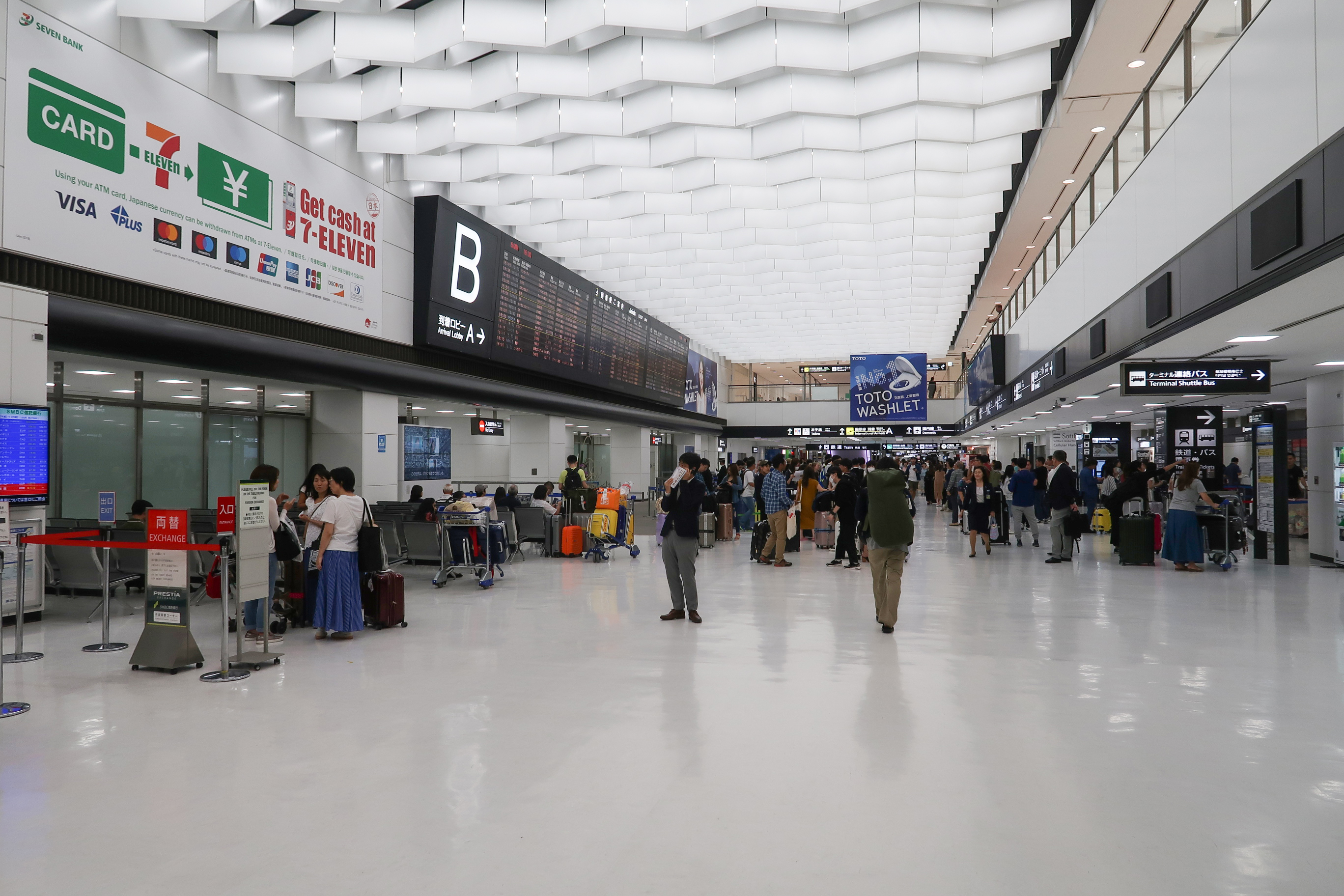 Narita Airport Terminal 2